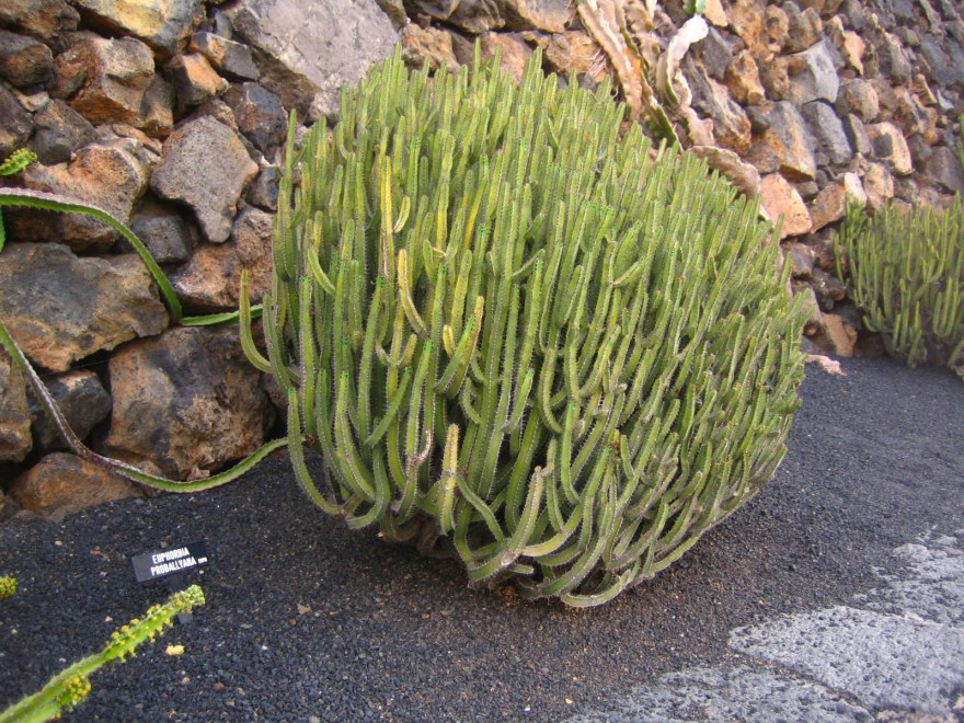 Euphorbia proballyana en el jardín de cactus de Lanzarote.